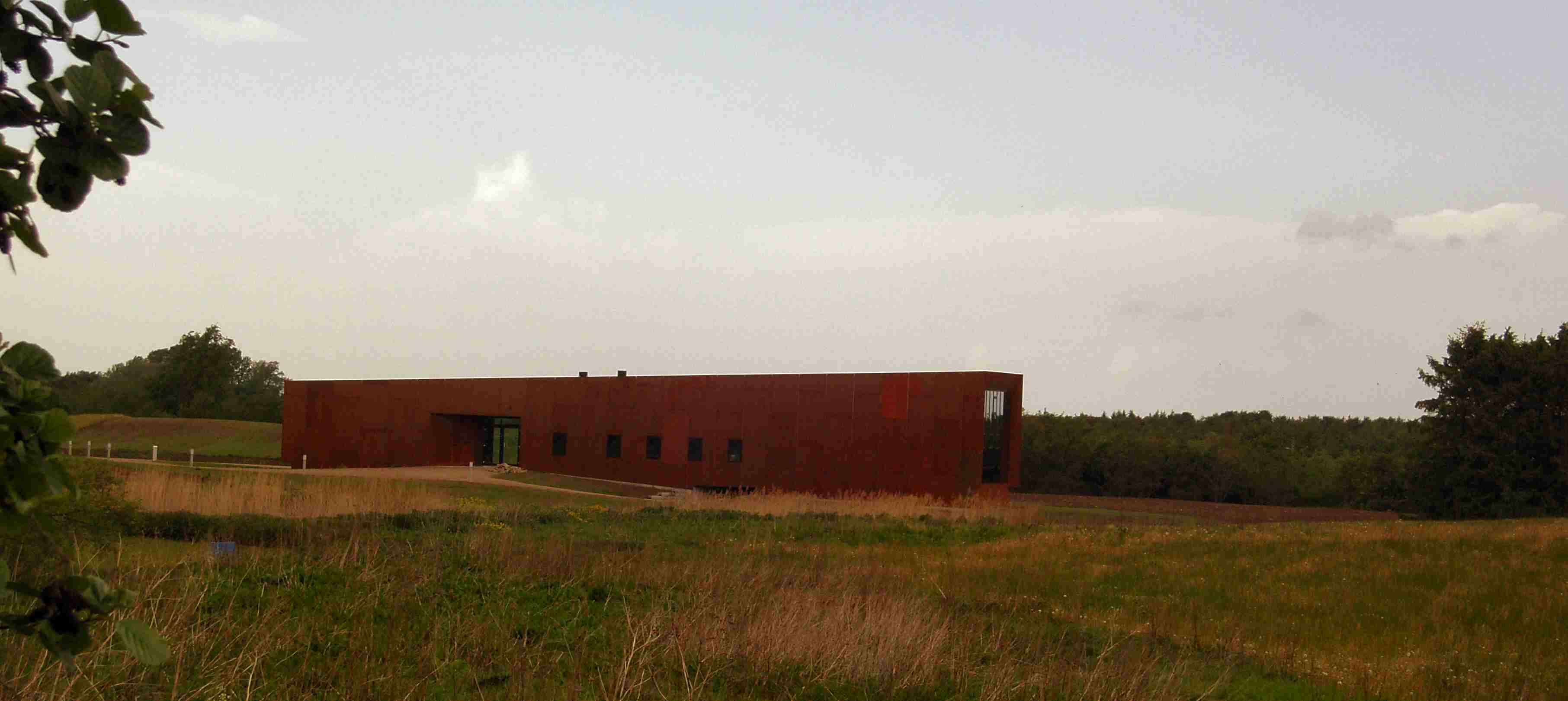 Danmarks Vej- & Bromuseum